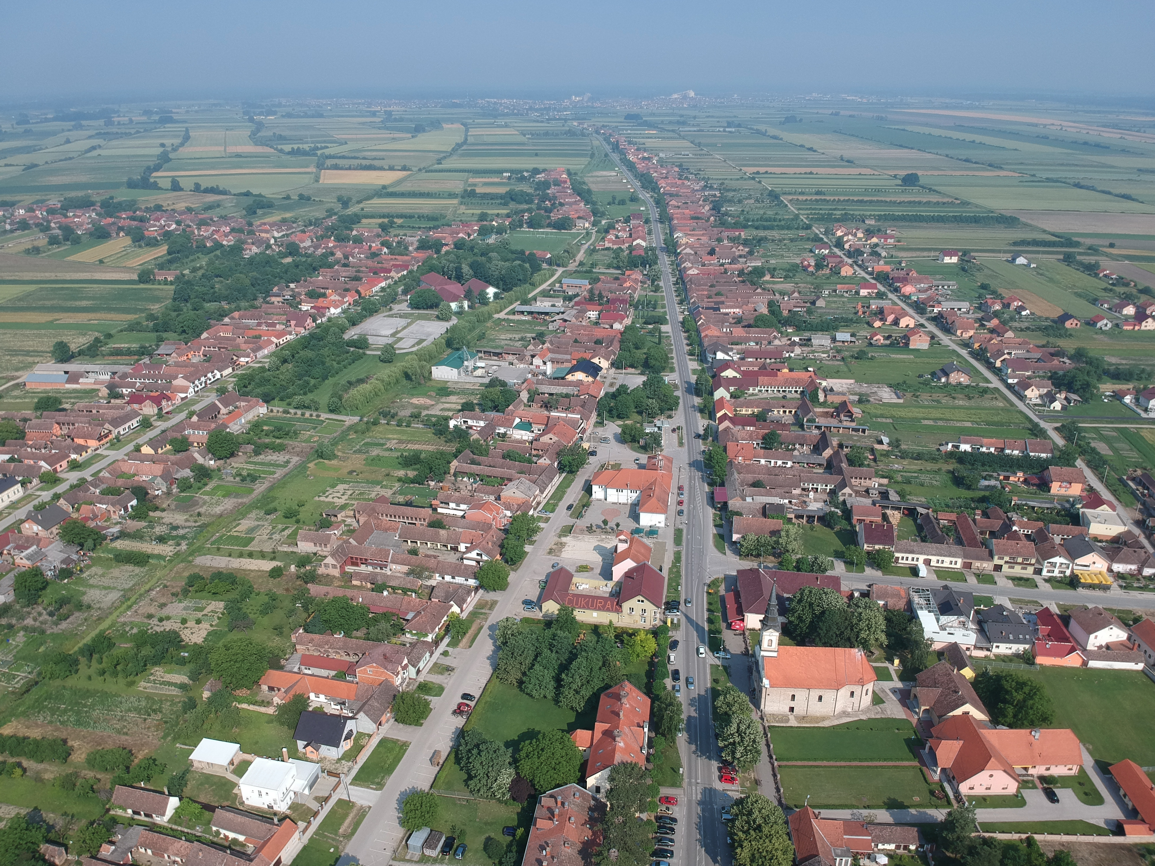 Bošnjaci 2018.